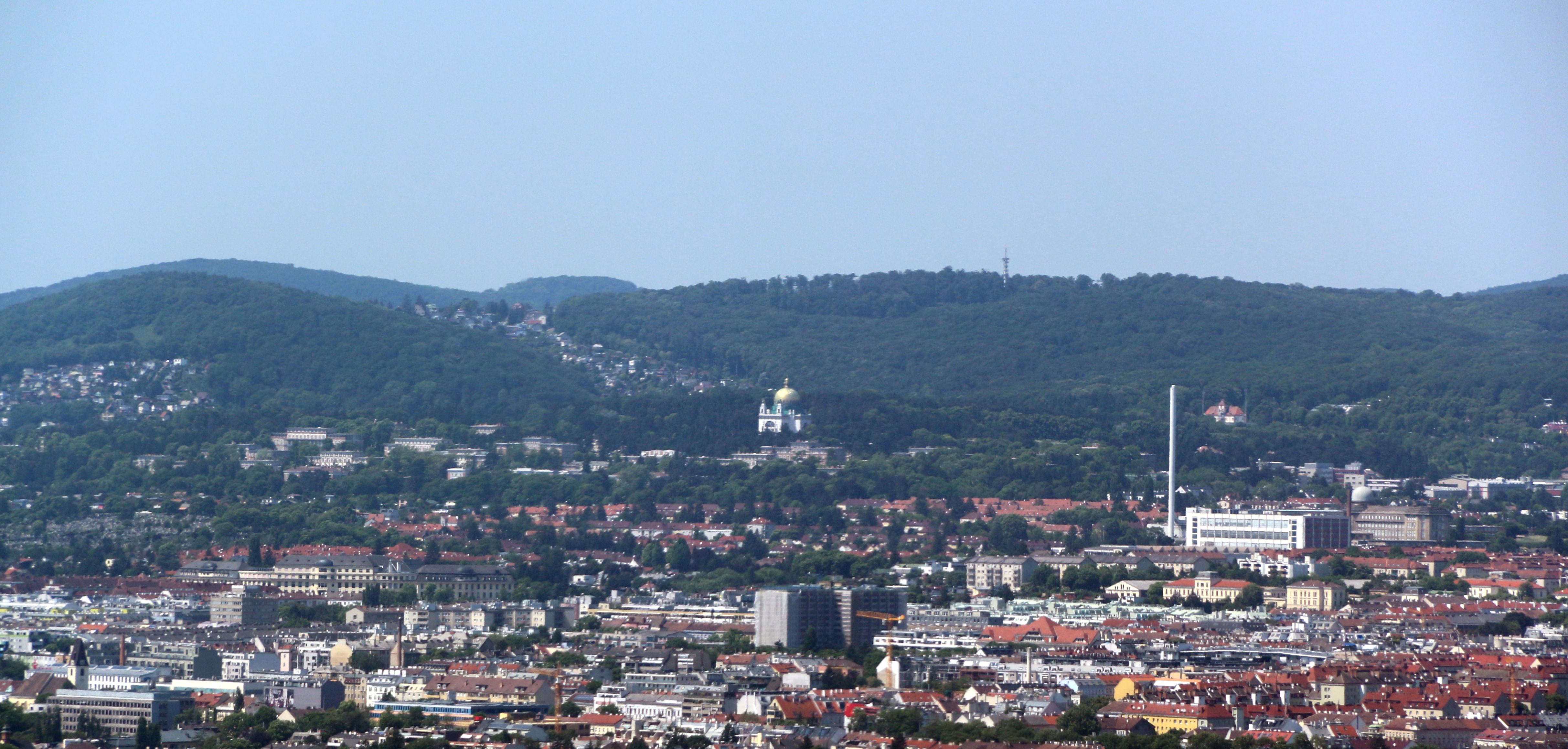 Kirche am Steinhof und Müllverbrennungsanlage Flötzersteig, gesehen von den Twin Towers am Wienerberg.